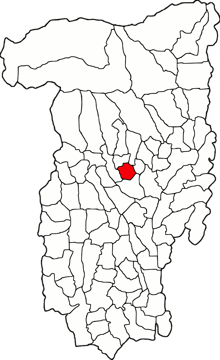 Lage der Gemeinde Păușești im Kreis Vâlcea (RO).